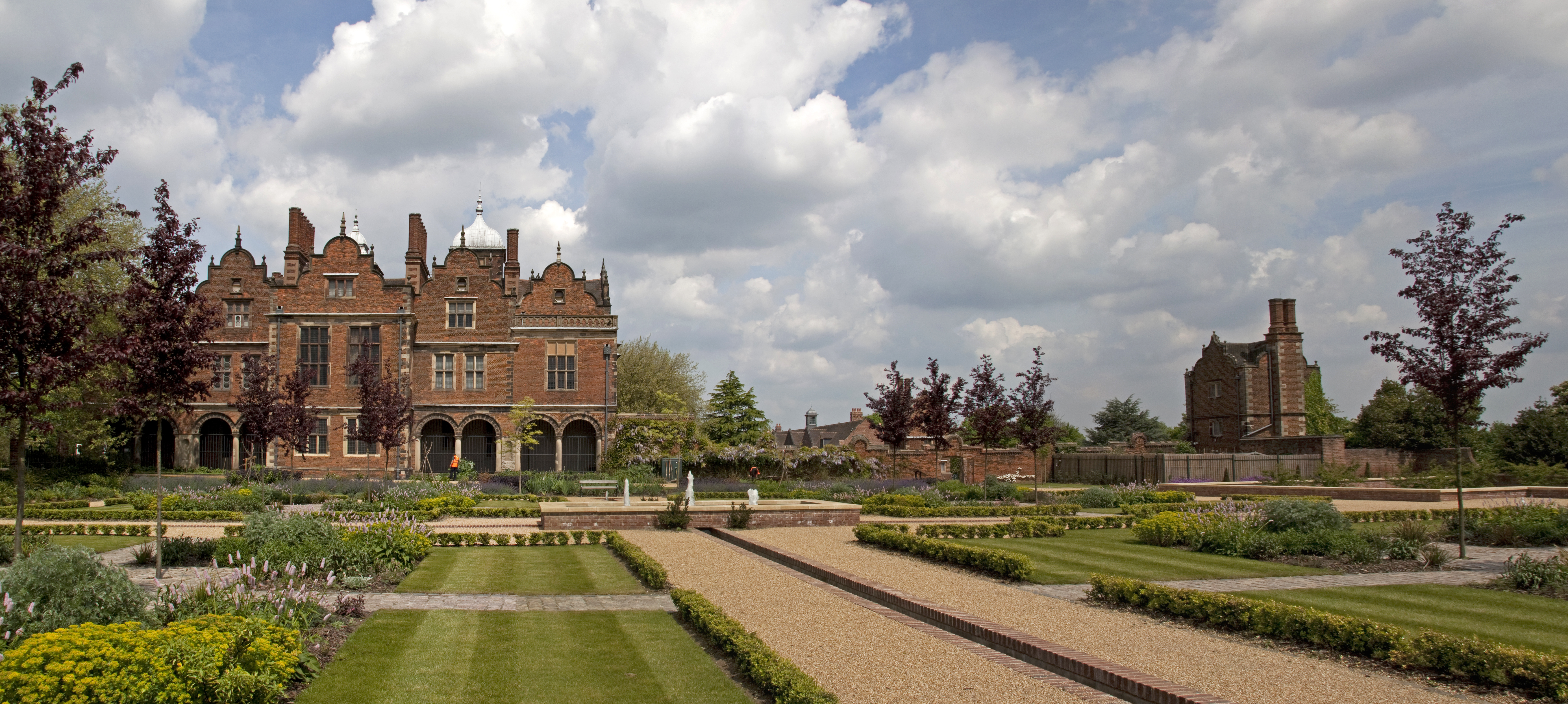 Aston Hall Gardens